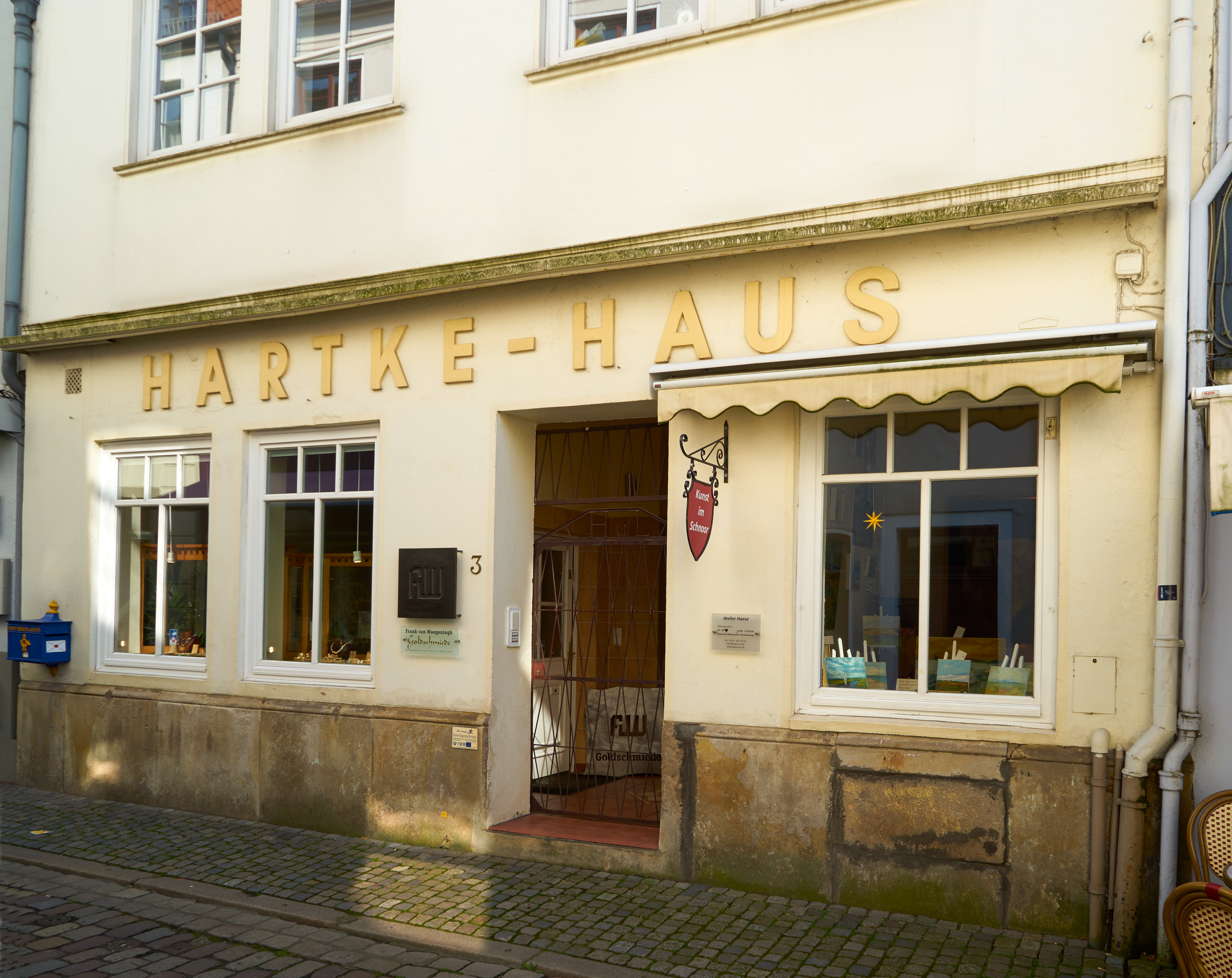 Hartke-Haus, Schnoor-Archiv in Bremen, Am Landherrnamt 3Das abgebildete Objekt ist ein geschütztes Kulturdenkmal in der Freien Hansestadt Bremen, mit der Nr. 1441 beim Landesamt für Denkmalpflege registriert.